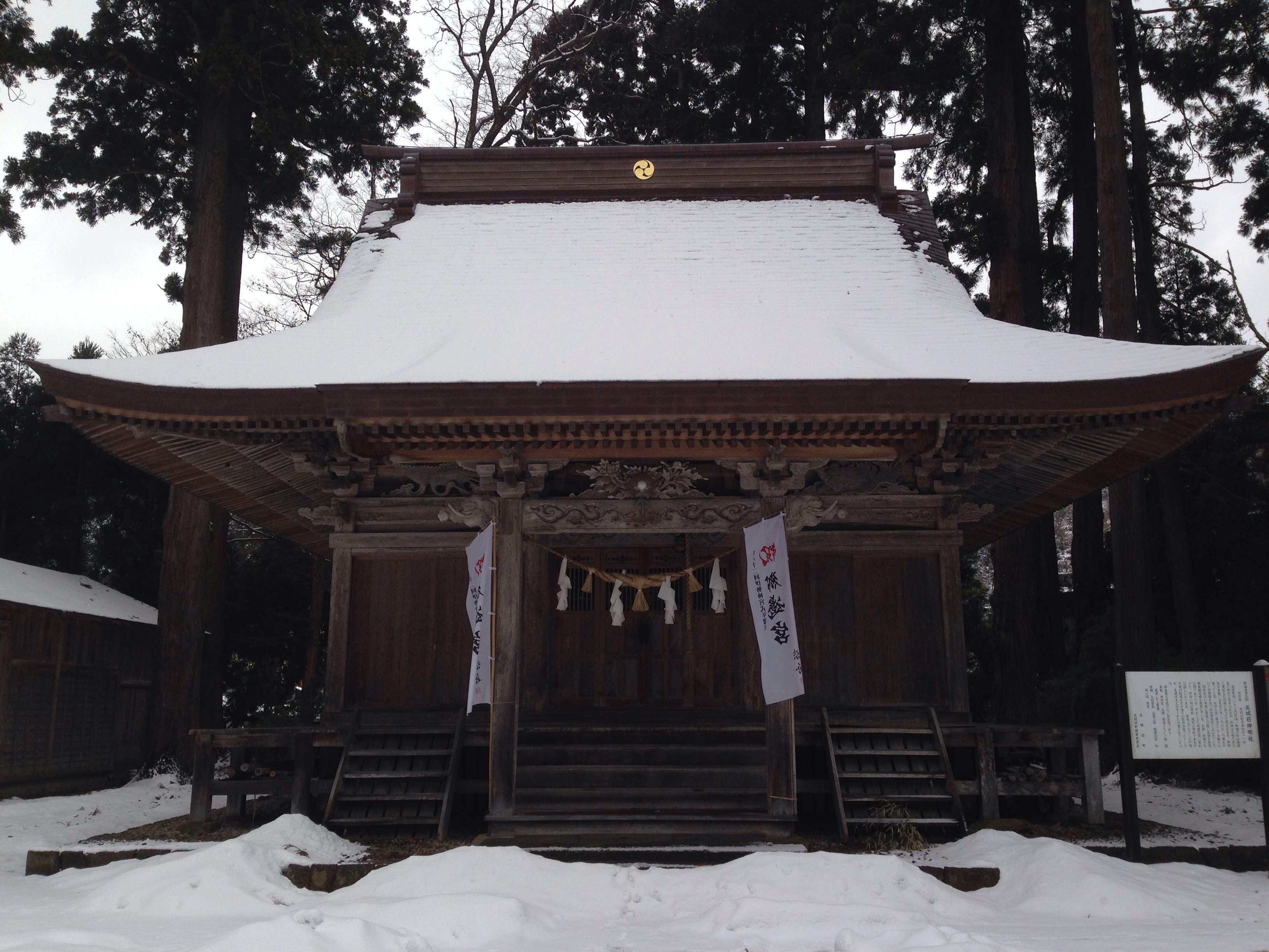 秋田県南秋田群五城目町にある神明社（拝殿）。